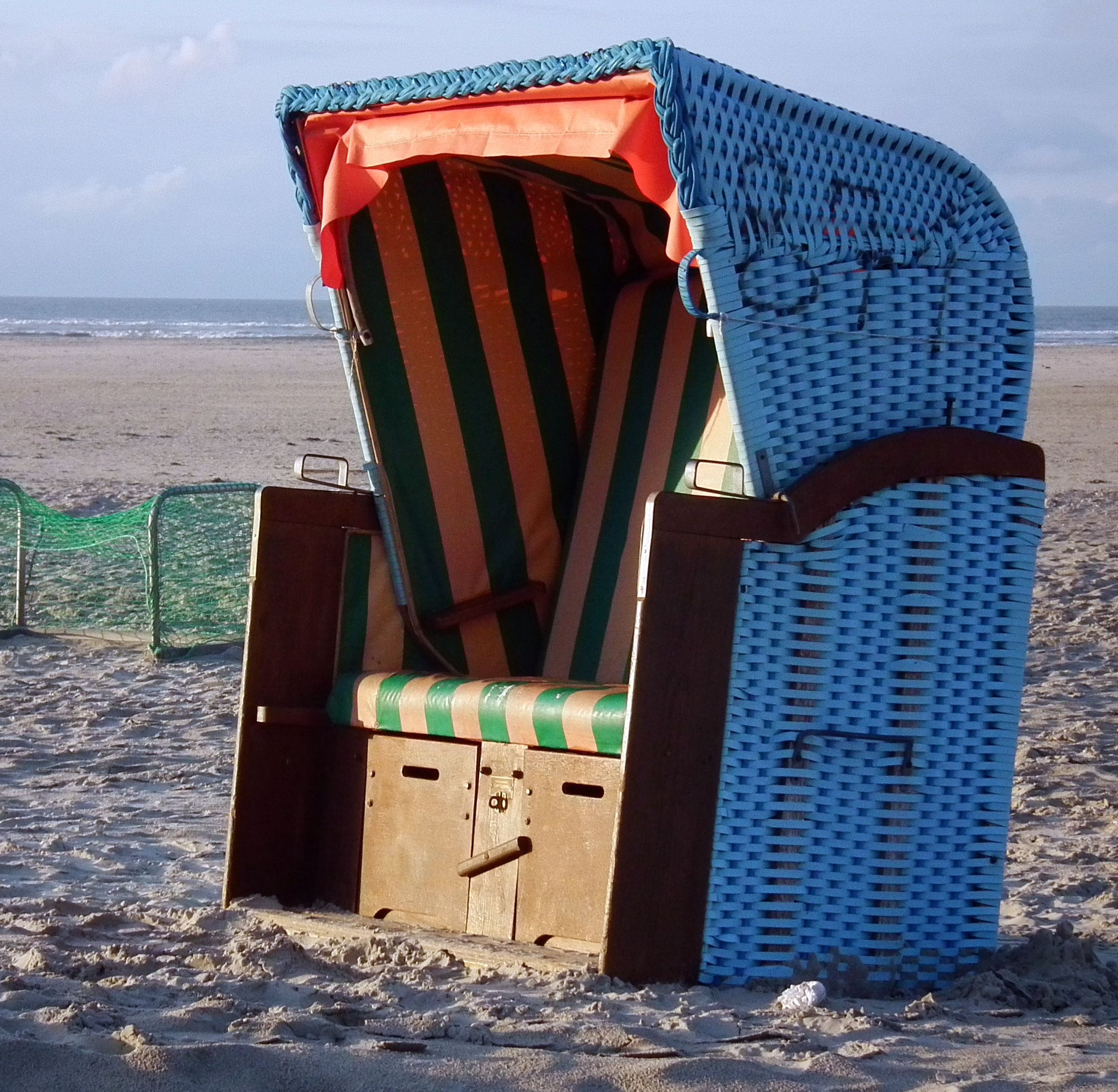 Blauer Strandkorb auf der ostfriesischen Nordseeinsel Juist (Niedersachsen, Deutschland) im Schein der untergehenden Sonne